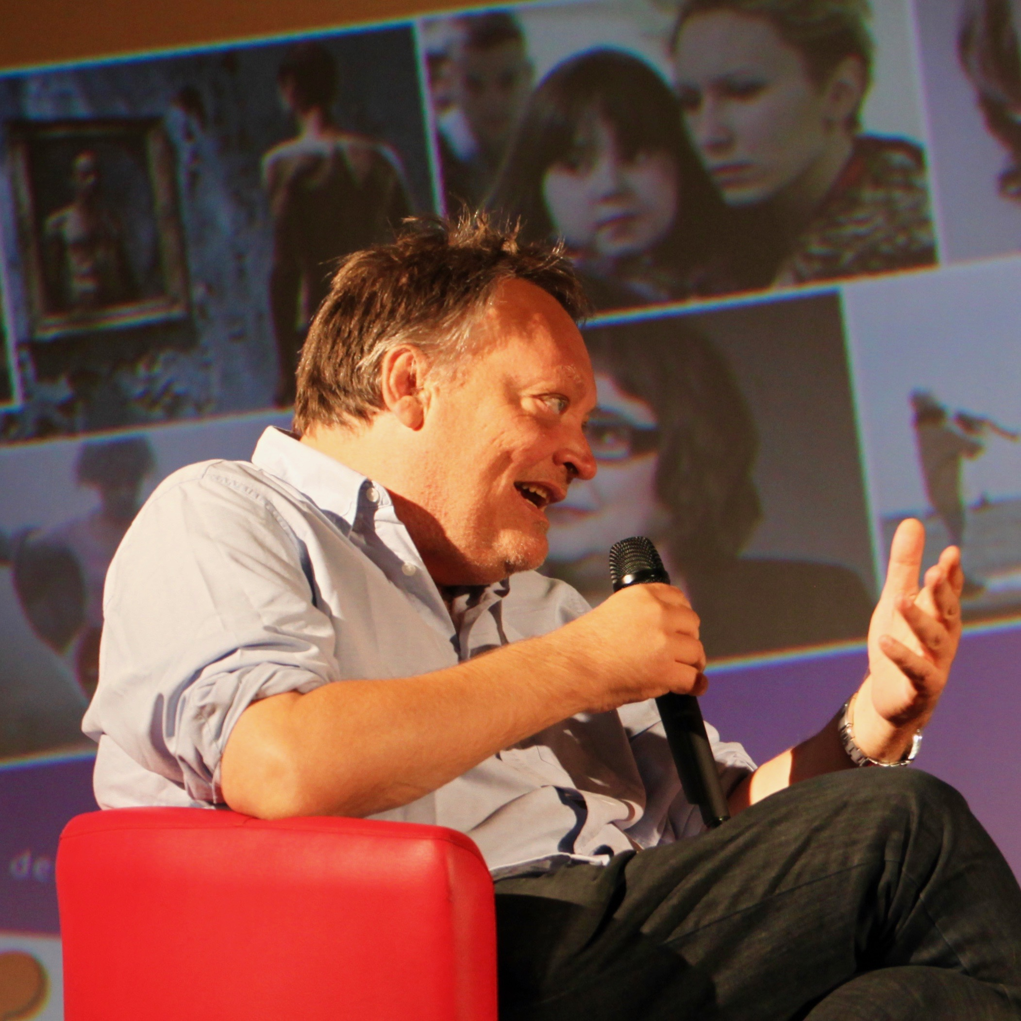 Pol Cruchten, à Cavaillon en 2016, pour la présentation de son film "La Supplication"